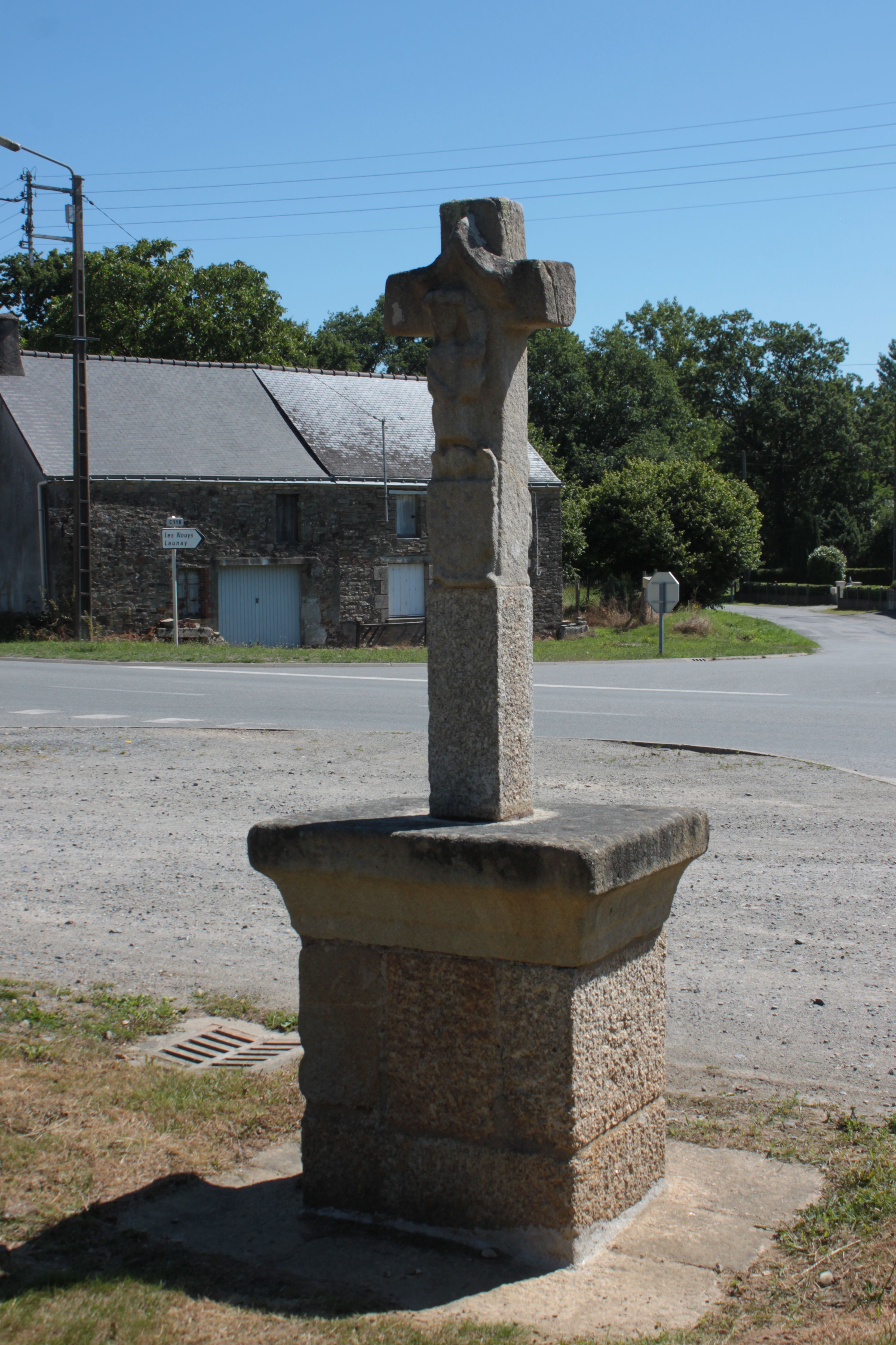 Croix du village le Val, à Rieux, Morbihan, France.